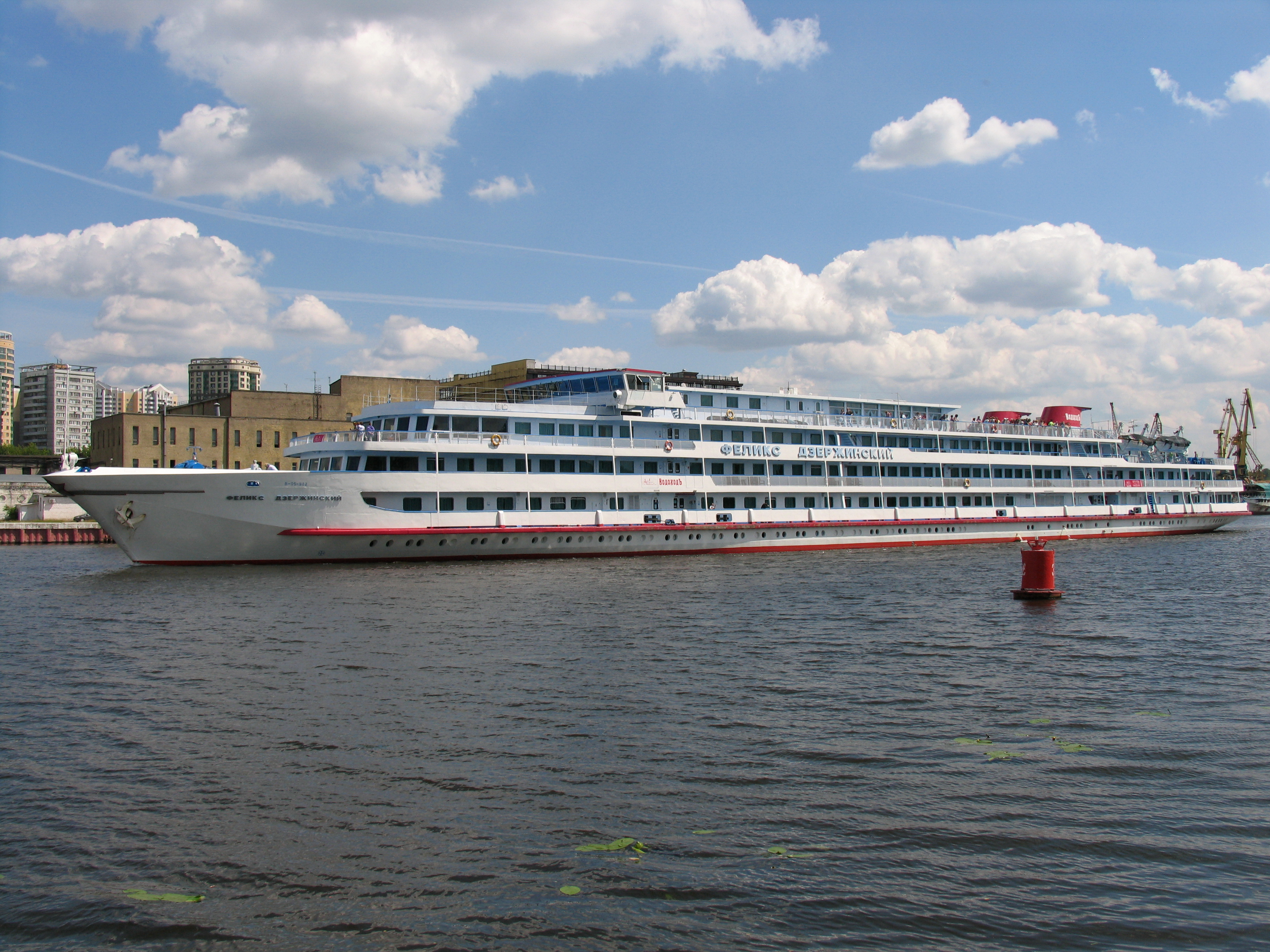 Речной круизный теплоход "Феликс Дзержинский" на Химкинском водохранилище.